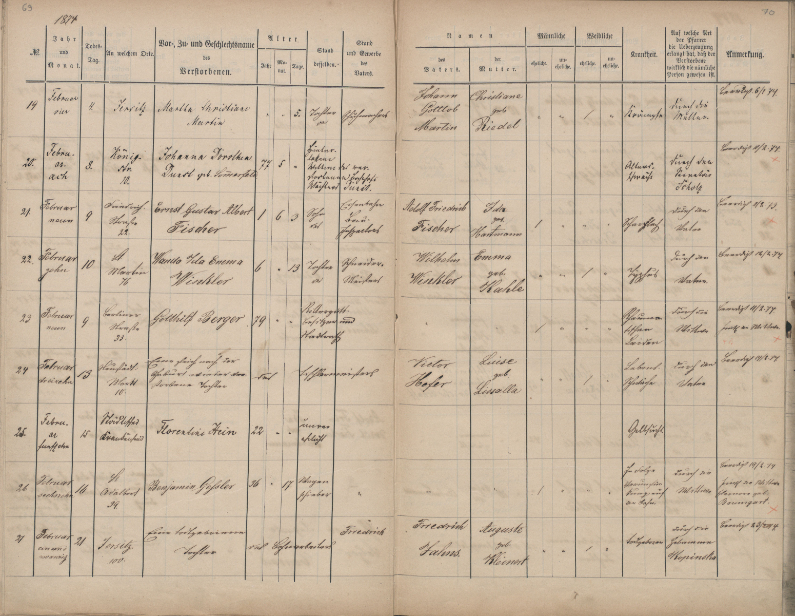 numer 23